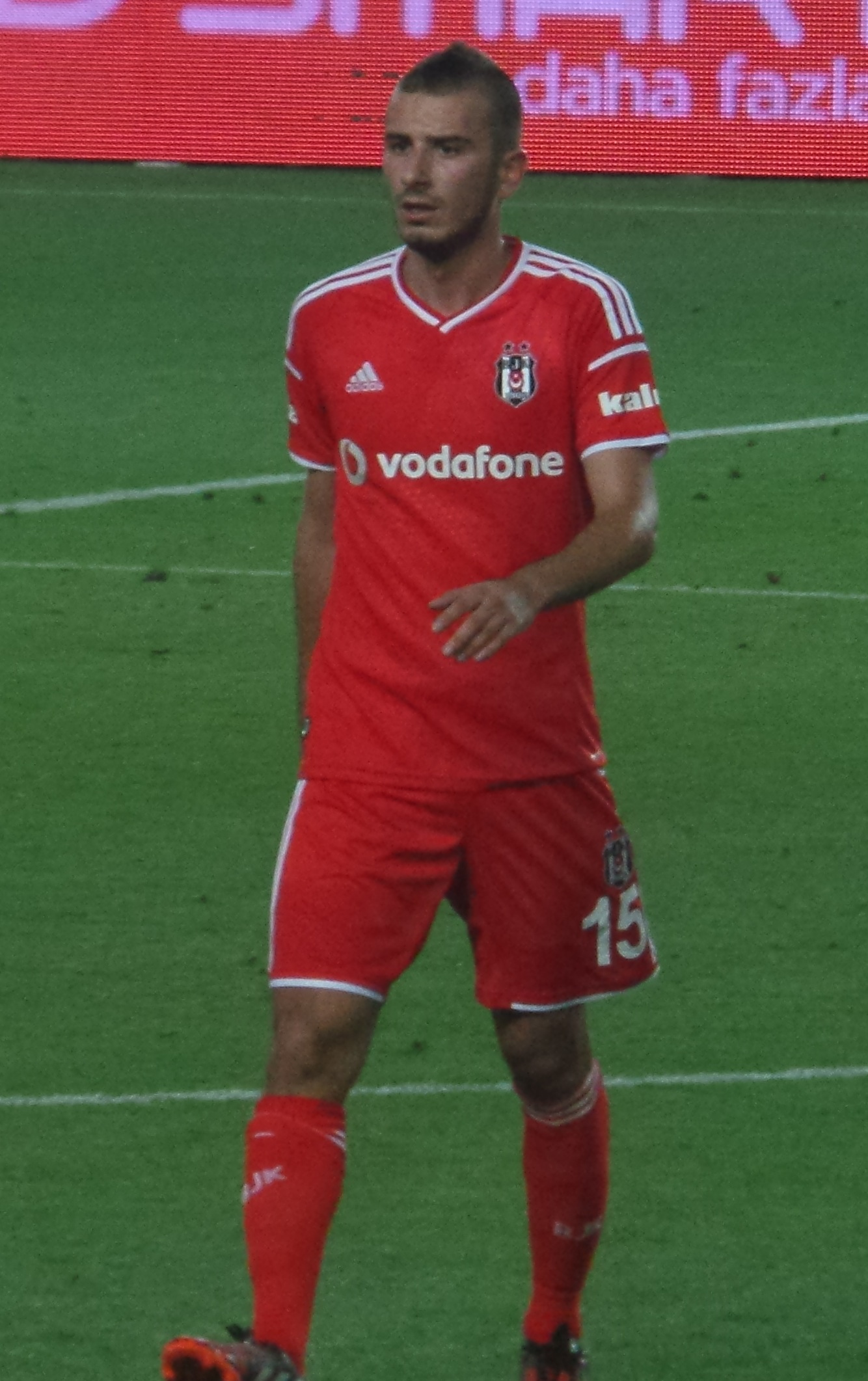 Özyakup CHELSEA maçında